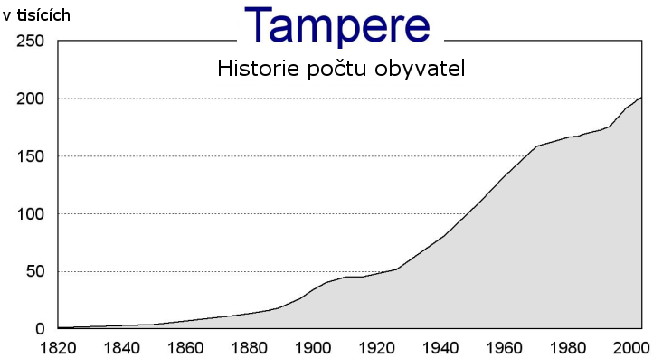 Graf počtu obyvatel v Tampere v posledních 200 letech.